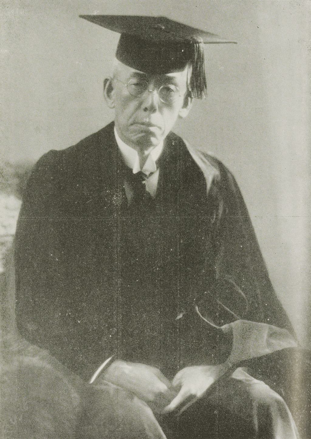 高田早苗（1860年-1938年）